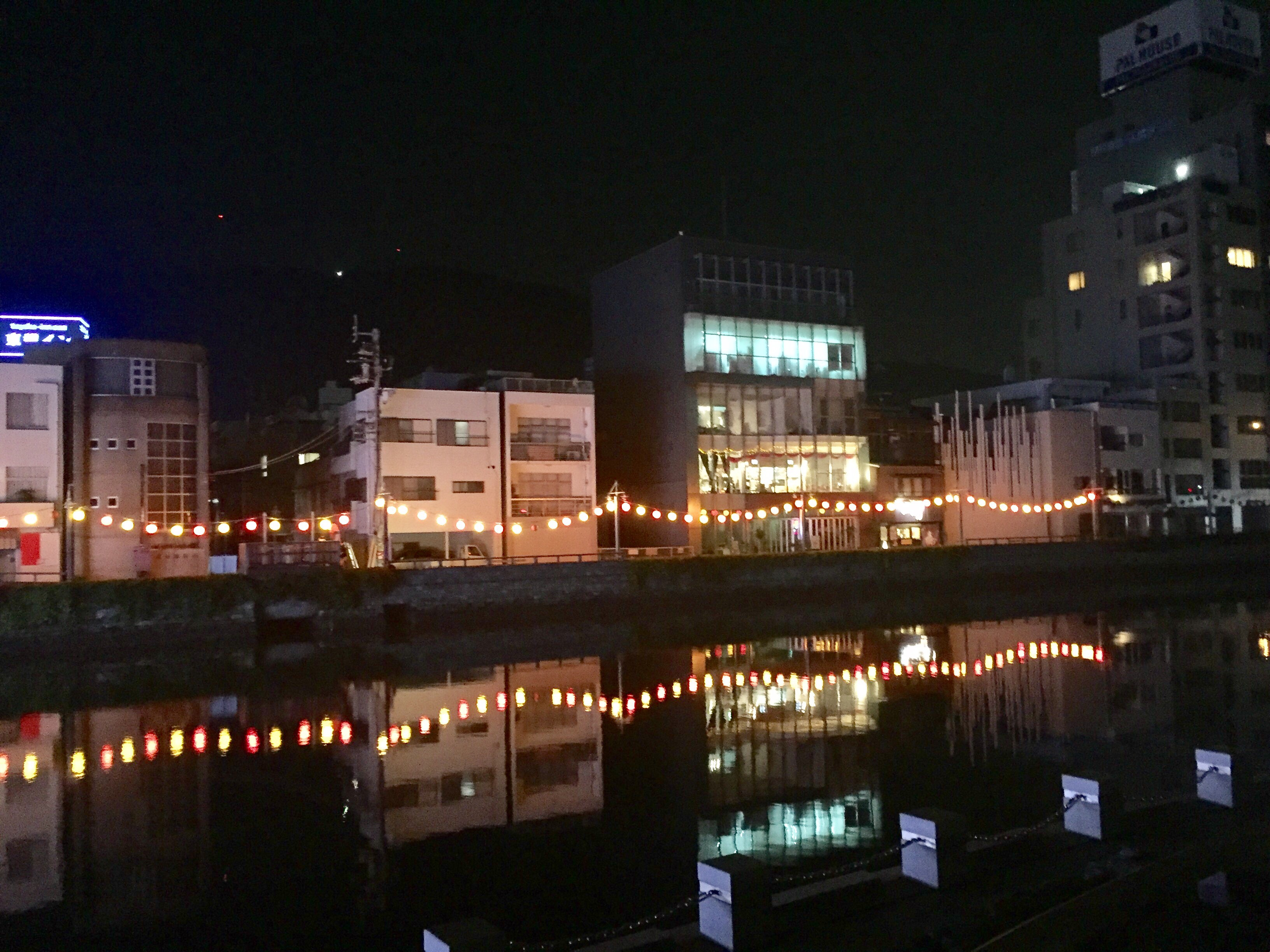 徳島県徳島市の新町川沿いに整備されたしんまちボードウォーク。日没後の様子。画像中心部のやや右側に国際東船場113ビルがある。